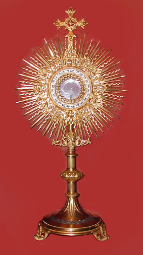 monstrance